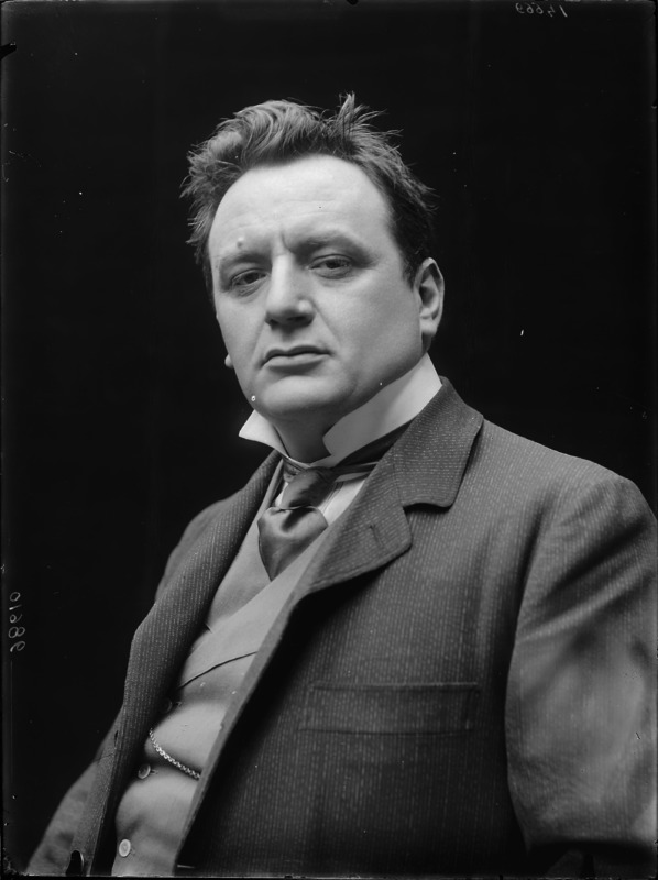 Eugenio Giraldoni